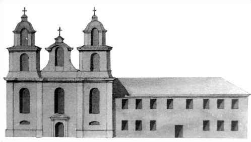 Беларуская (тарашкевіца): Менск (Miensk), вуліца Зборная (vulica Zboravaja). Касьцёл Сьвятога Войцеха і кляштар бэнэдыктынак да маскоўскай перабудовы